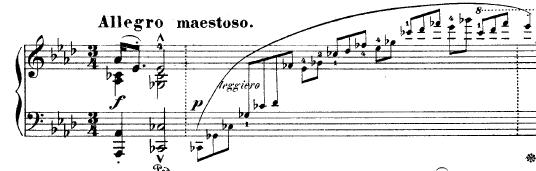 Inicio de la Polonesa Fantasía de Frédéric Chopin. Beginning of the Polonaise-Fantaisie by Fryderyk Chopin. Début de la Polonaise-Fantaisie de Fryderyk Chopin. Anfang des Polonaise-Fantaisies von Fryderyk Chopin.